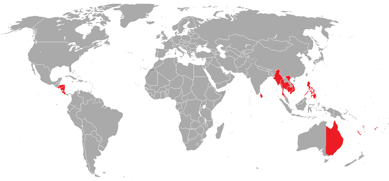 Tagged version of BlankMap-World.png